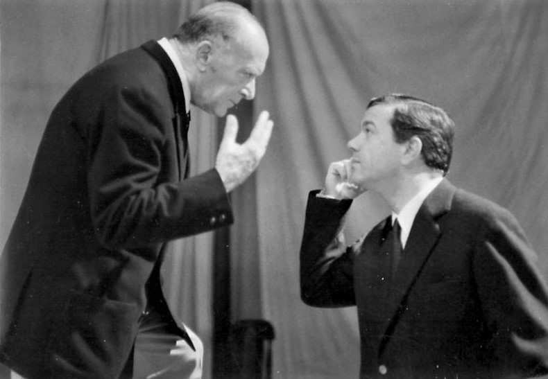 Renzo Ricci e Giampiero Becherelli in "Enrico IV" di Pirandello